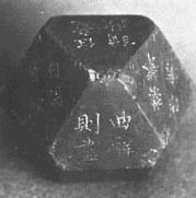 korean14dice.JPG